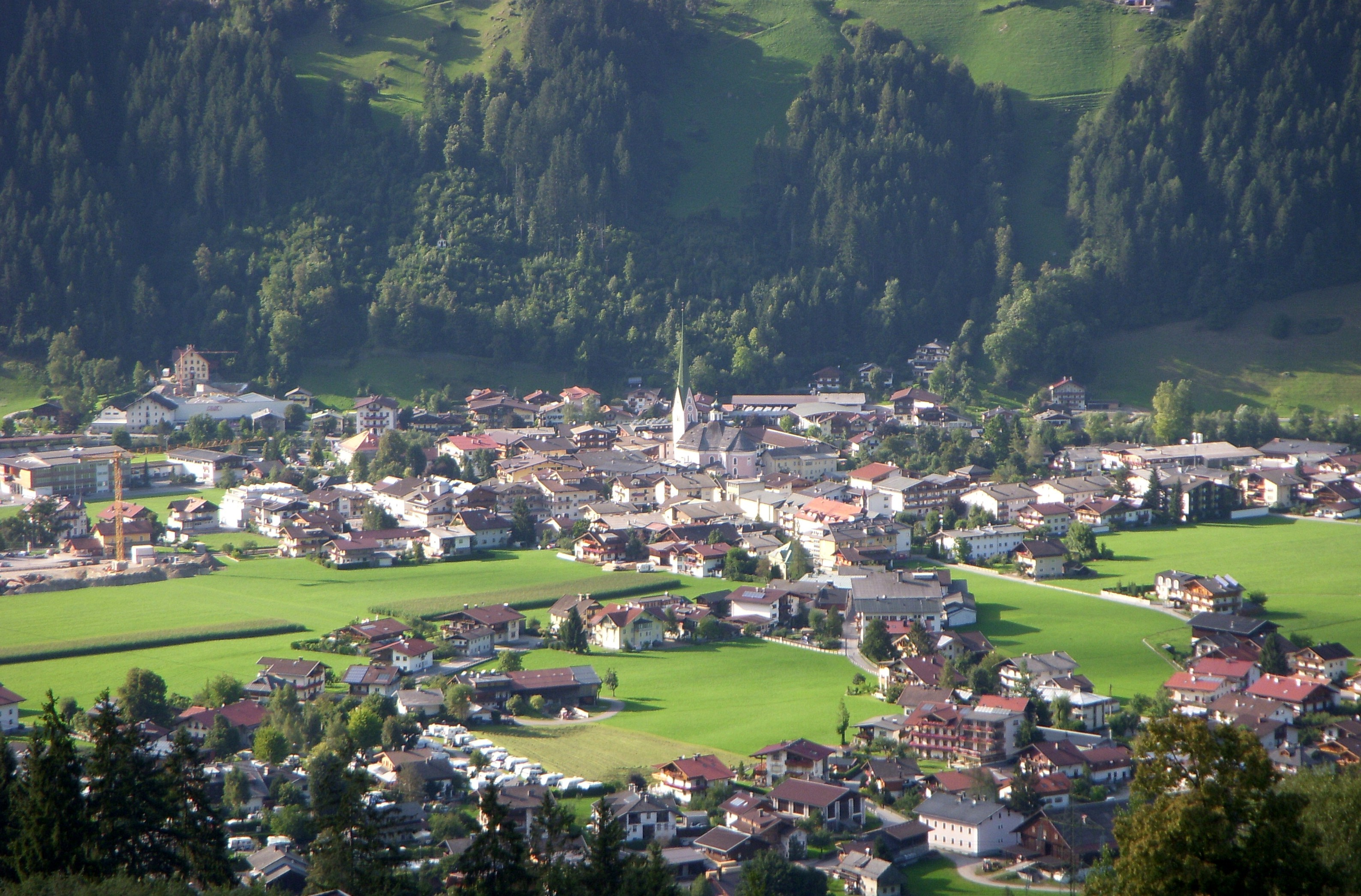 Zell am Ziller im Zillertal, Österreich